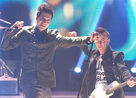 Sinplus на национальном швейцарском отборе на Евровидение